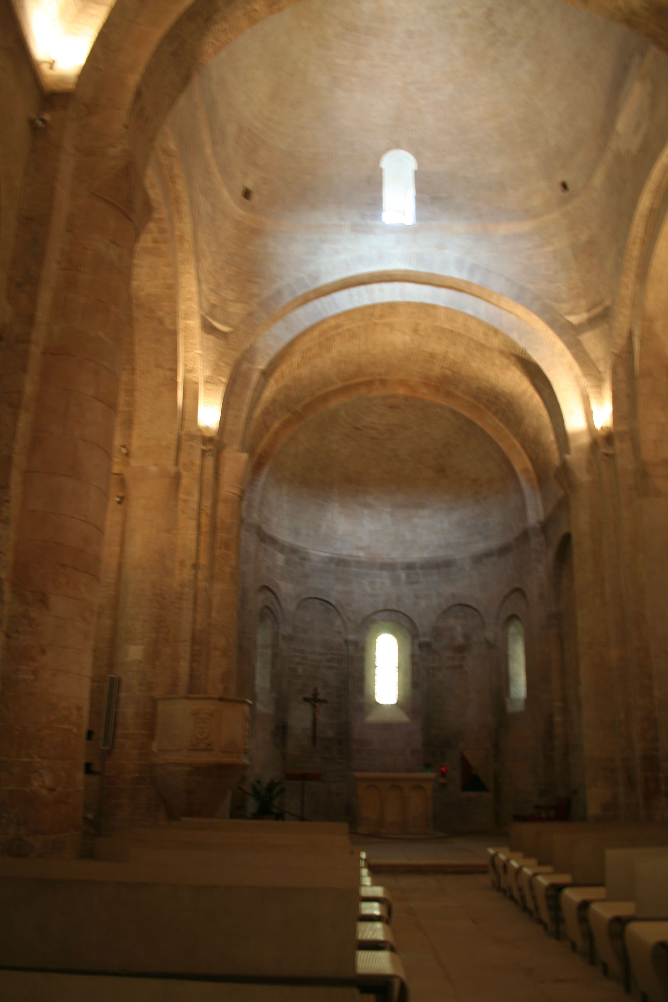 Saint-Martin-de-Londres (Hérault) - Église romane Saint-Martin - nef.